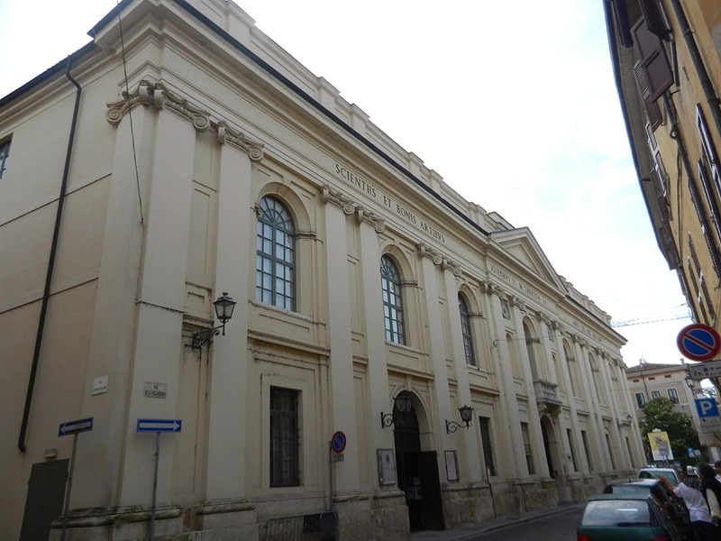 Mantova - Teatro Scientifico (o Bibiena)